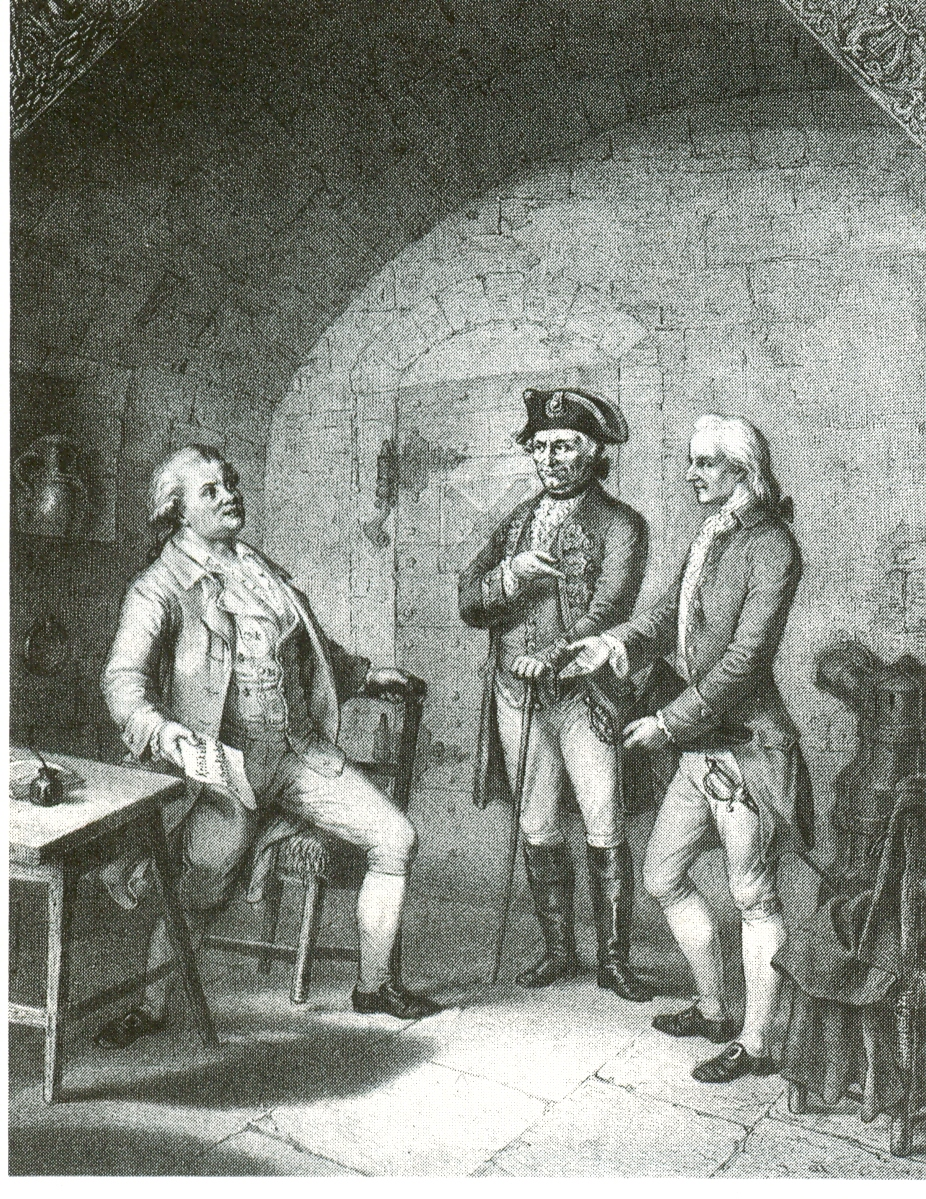 Der Besuch Schillers bei Schubart auf dem Hohenasperg im Jahre 1781 (Lithographie)